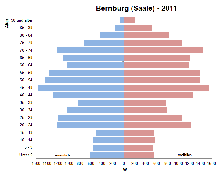 Bevölkerungspyramide der Stadt Bernburg (Saale) nach Zensus 2011.